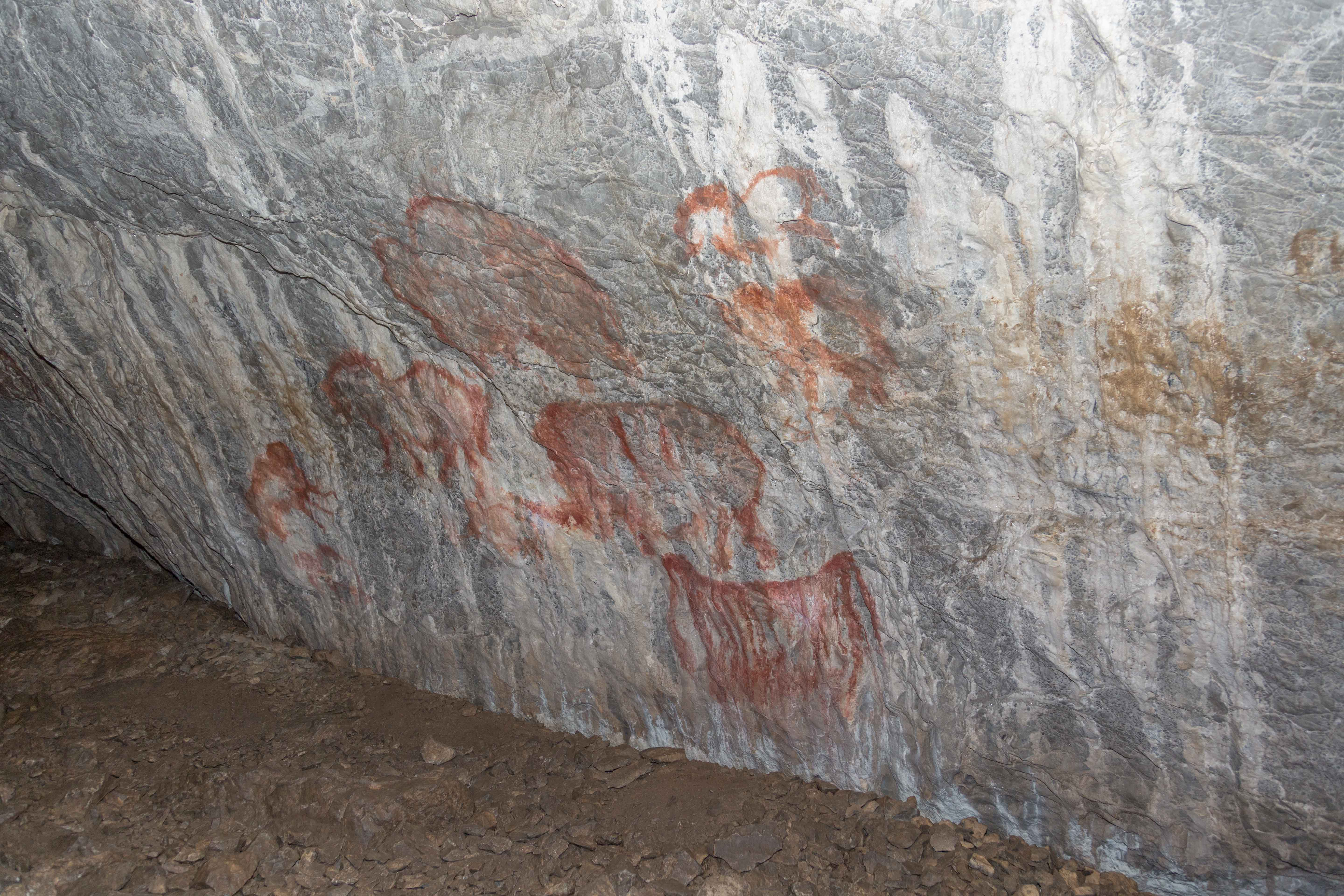 Капова пещера (Шульган-Таш), Бурзянский район This image is related to the protected area of Russia number 0220101